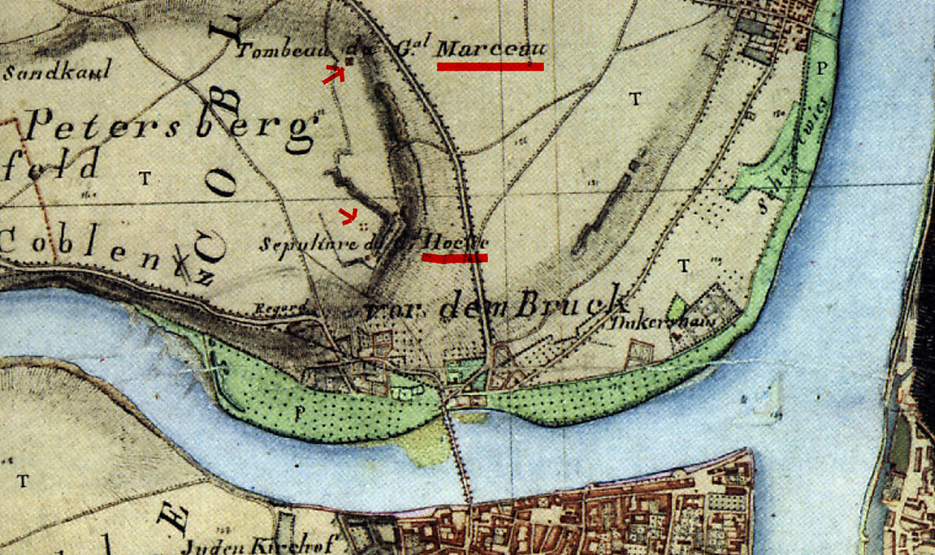 Erste kartografische Aufnahme von den Grabstätten der französischen Revolutionsgenerale Hoche und Marceau in Koblenz